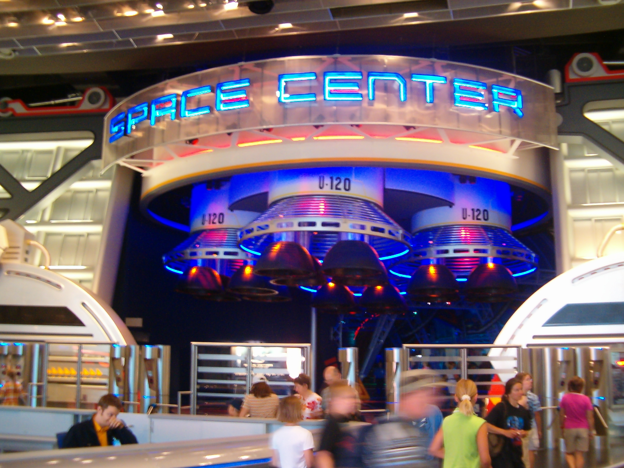 Eingangsbereich des SCB